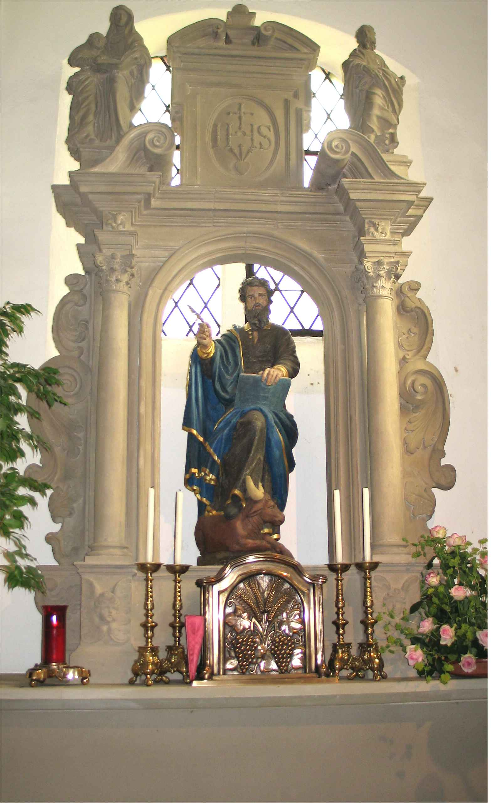 Rietse Säitenaltor an der Kapell op der Giischterklaus. Kategorie:Gemeng Rouspert Giischterklaus